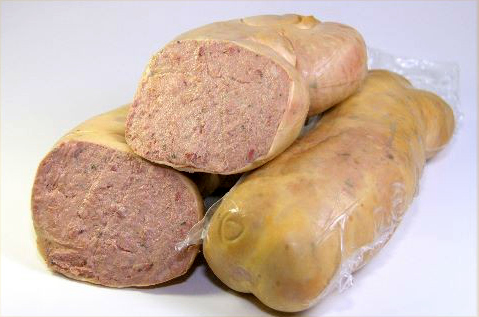 In England käuflich zu erwerben durch Direktimport aus Deutschland etwas groeber als feine Leberwurst mit kraeftigeren, rauchigen Geschmack.